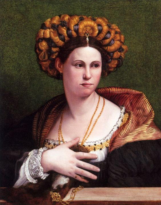 Laura de'Dianti? [1]